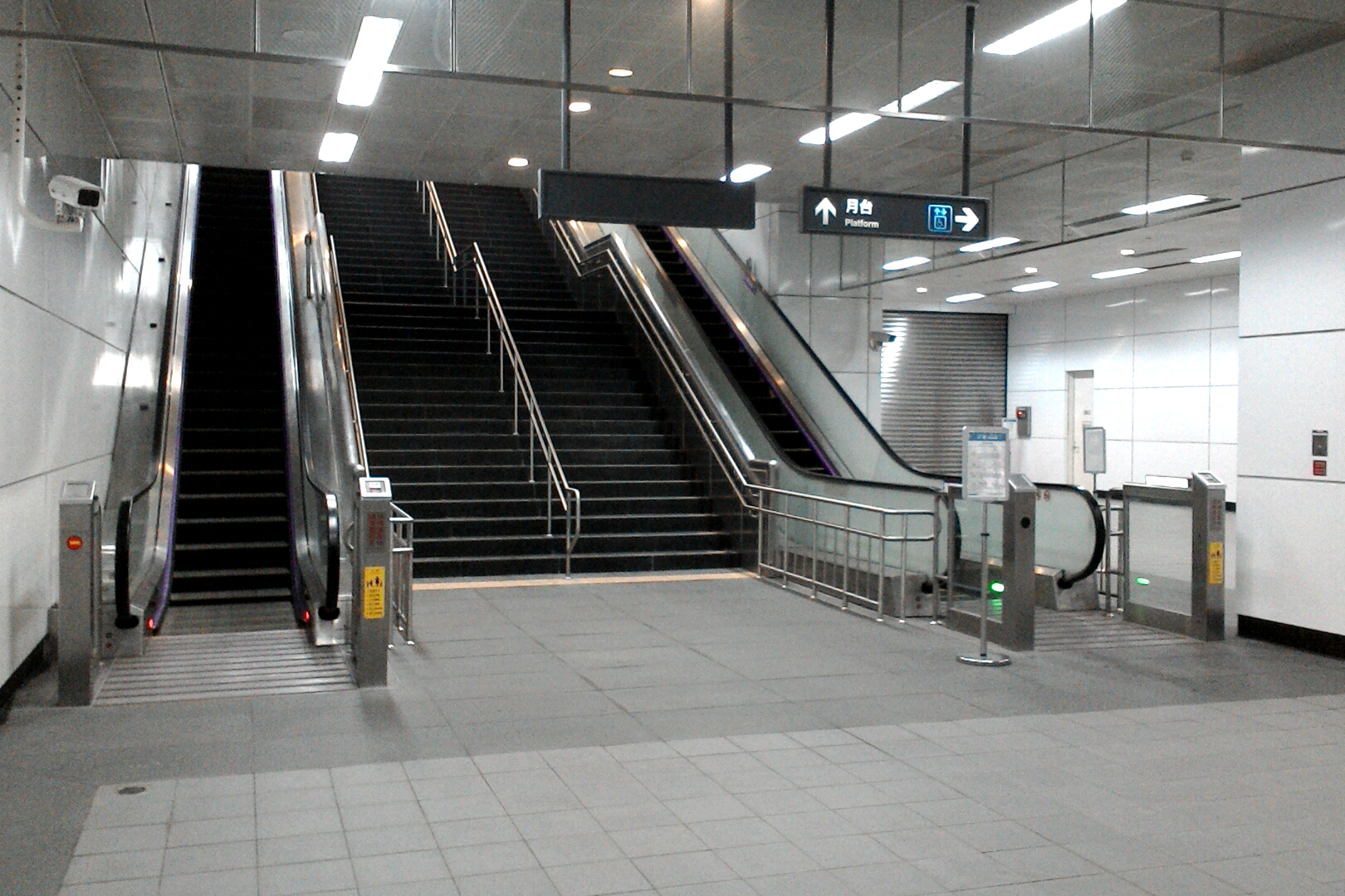 機場捷運長庚醫院站電扶梯。